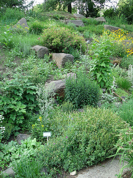 Rock garden in Alexander Fomin Botanical Gardens, Kiev.